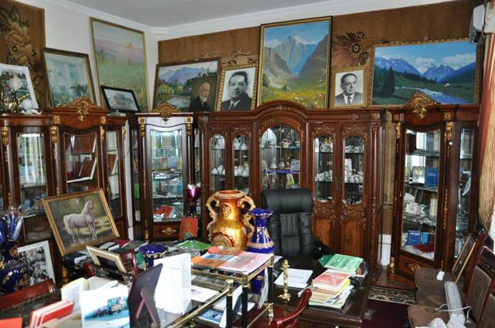 Музей академика Бободжана Гафурова находиться в г. Гафуров, Согдийская область, Таджикистан.Тоҷикӣ: Осорхонаи академик Б. Ғафуров. ш. Ғафуров, вилояти Суғд, Тоҷикистон